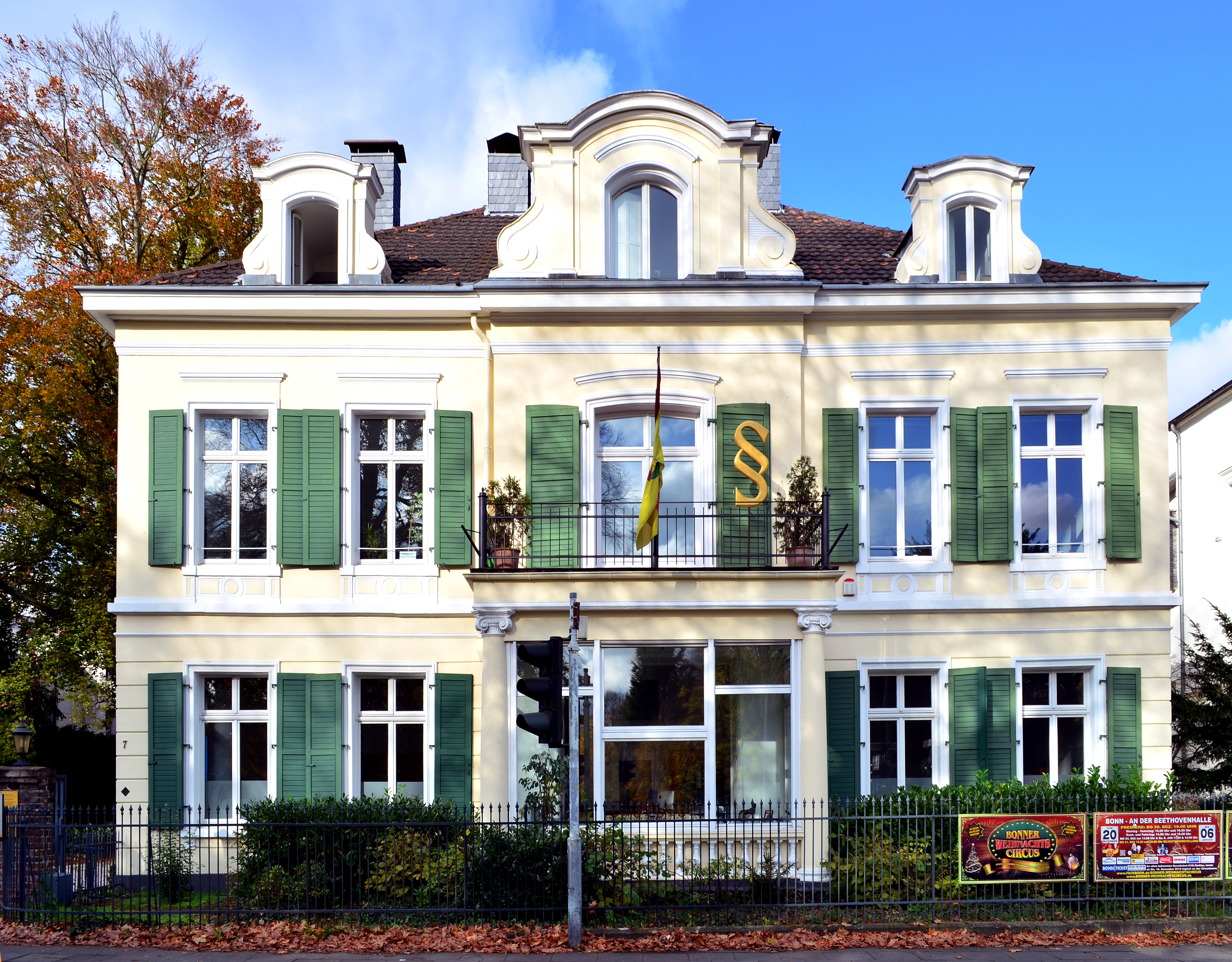 Denkmalgeschützte Villa, Am Kurpark 7, Bad Godesberg, Ortsteil Alt-Godesberg